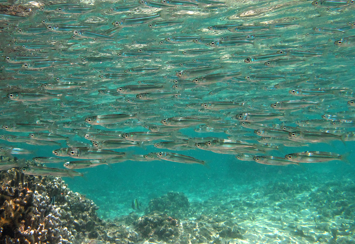 Un banc de Atherinomorus lacunosus à la Réunion.